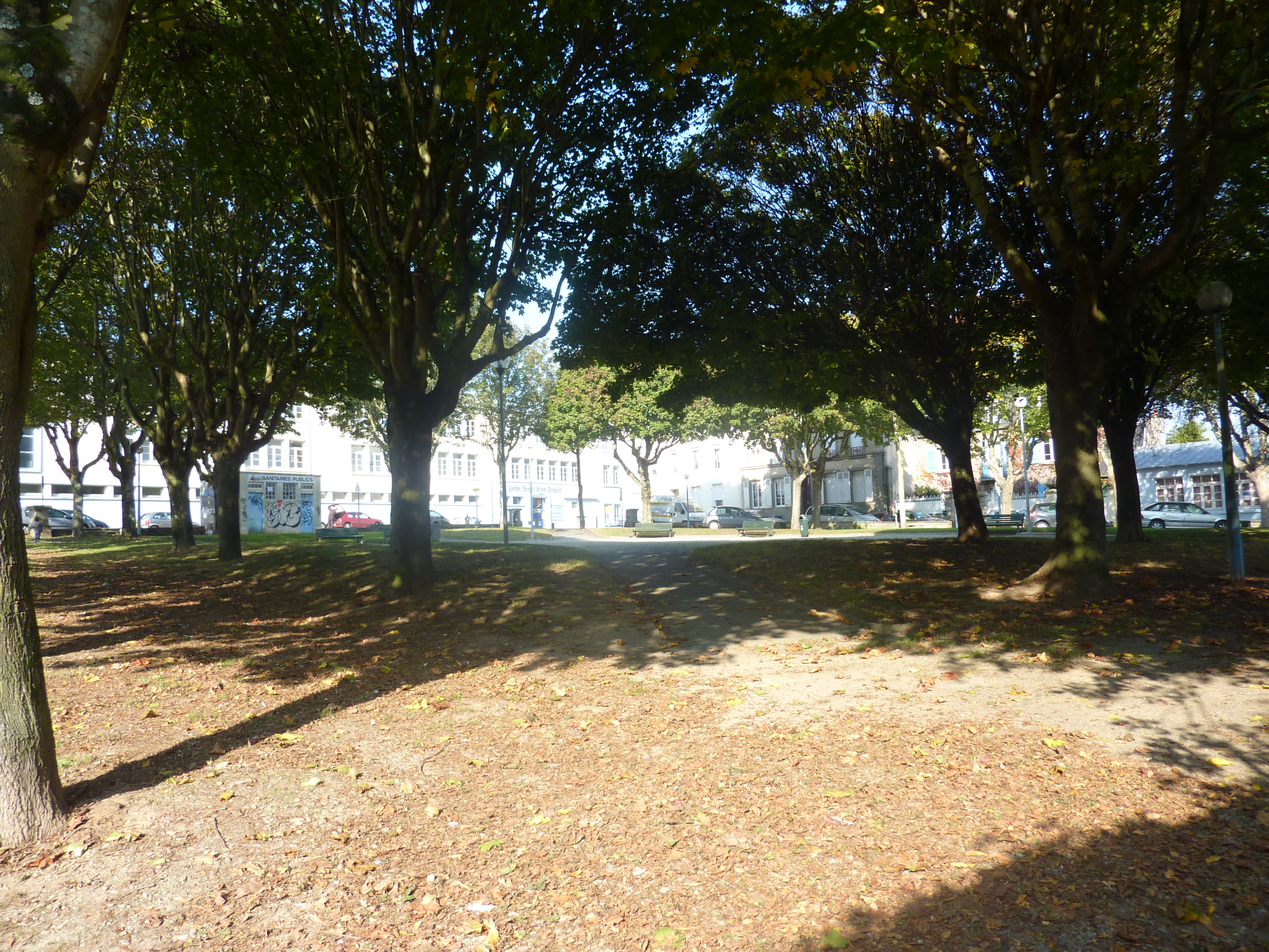 Brest Recouvrance : la place Ronarc'h, ancienne place du Champ de bataille (alors non plantée d'arbres), coeur traditionnel de la vie de Recouvrance